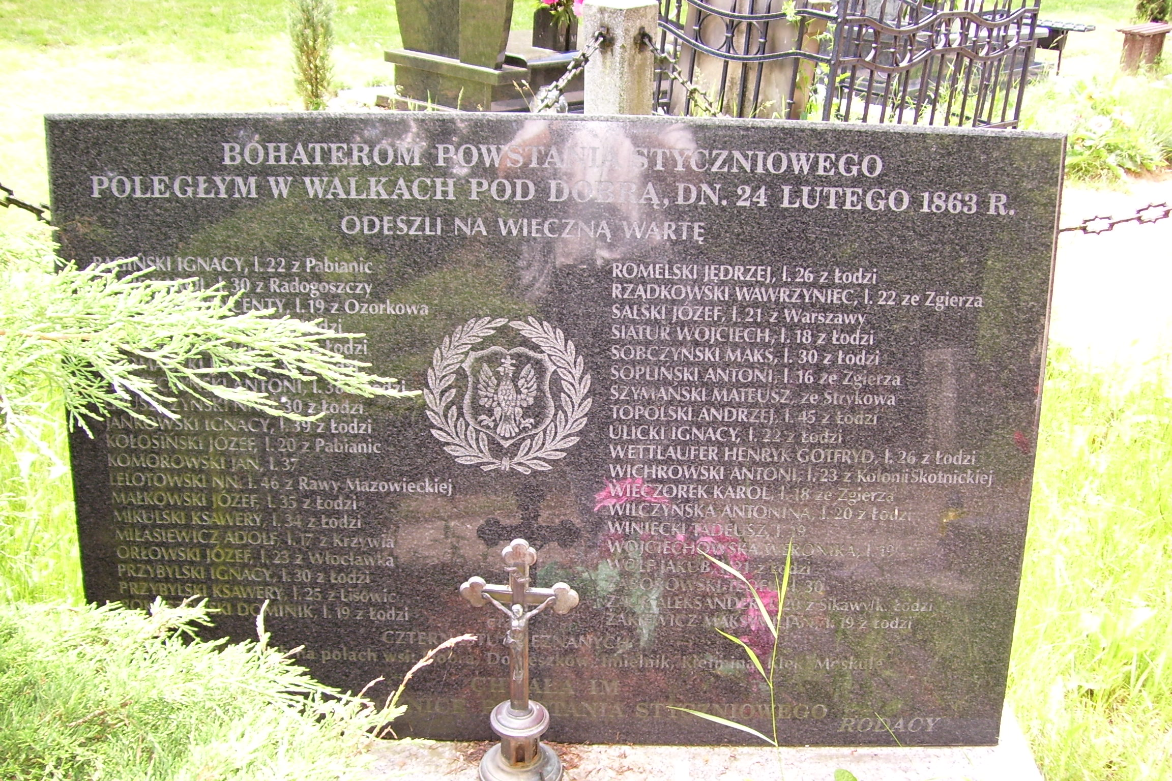 Płyta ufundowana w 140 rocznicę powstania styczniowego - cmentarz w Dobrej